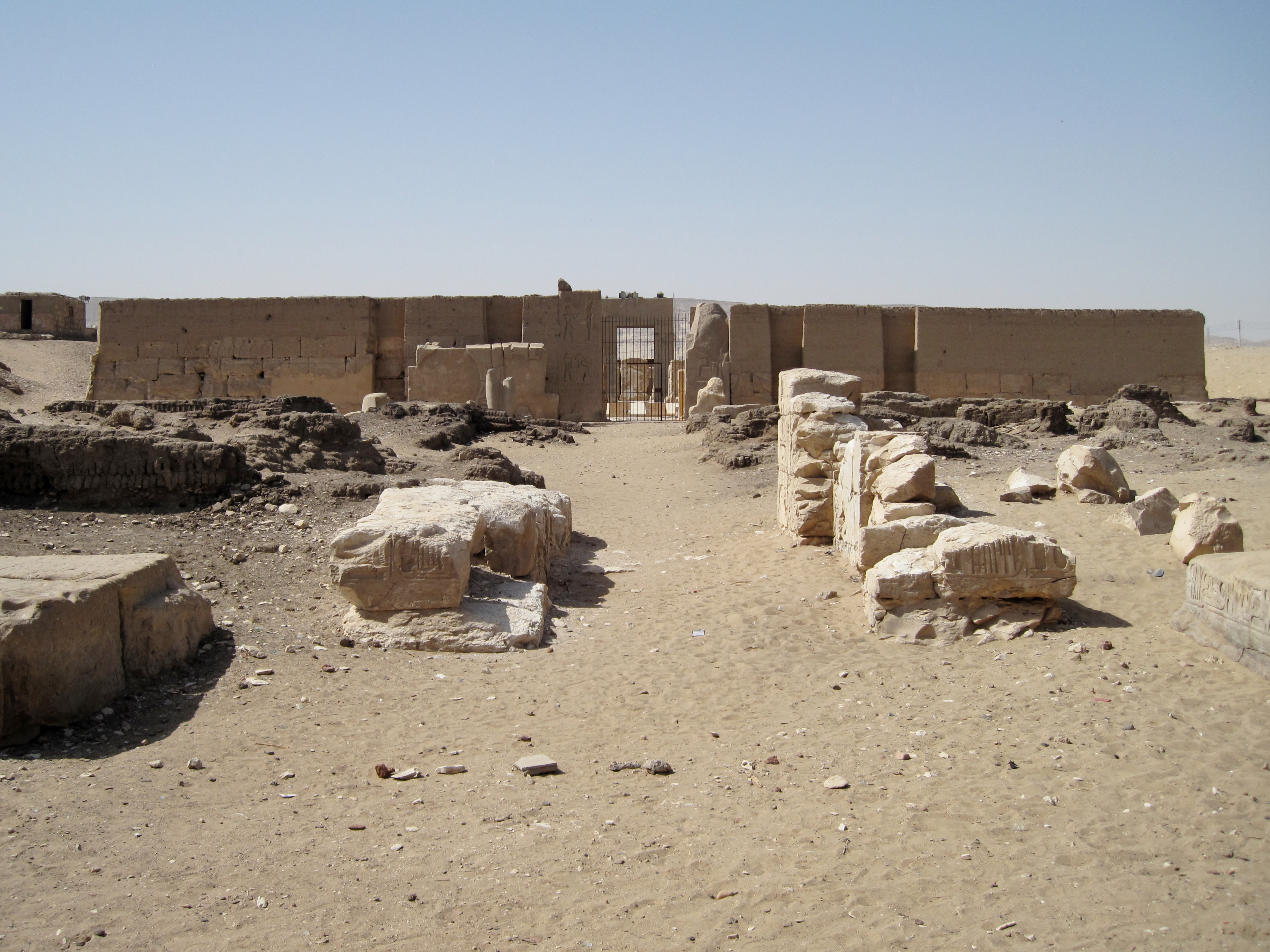 Tempel Ramses II. in Abydos, Ägypten